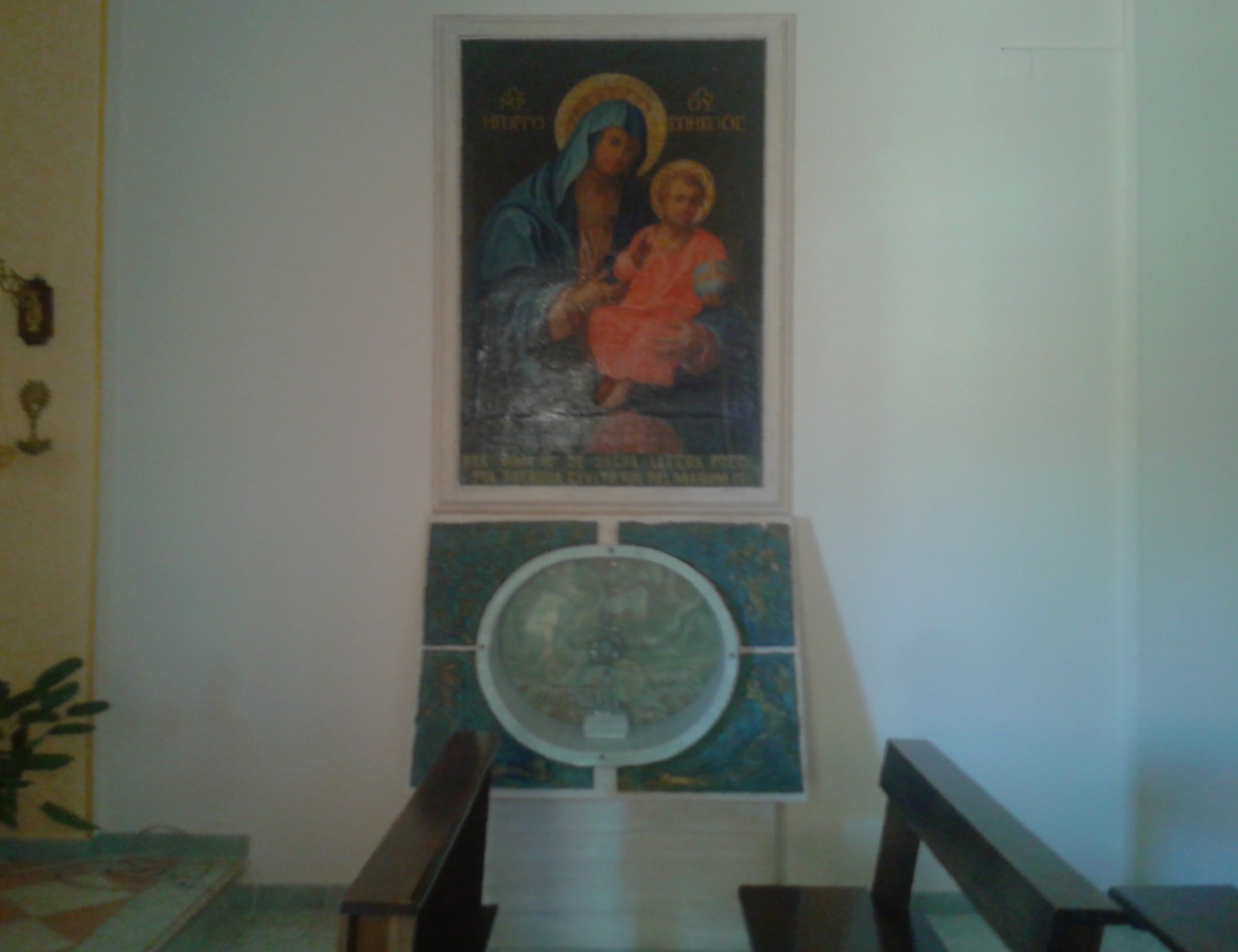 Dipinto Madonna della Sacra Lettera di Palmi